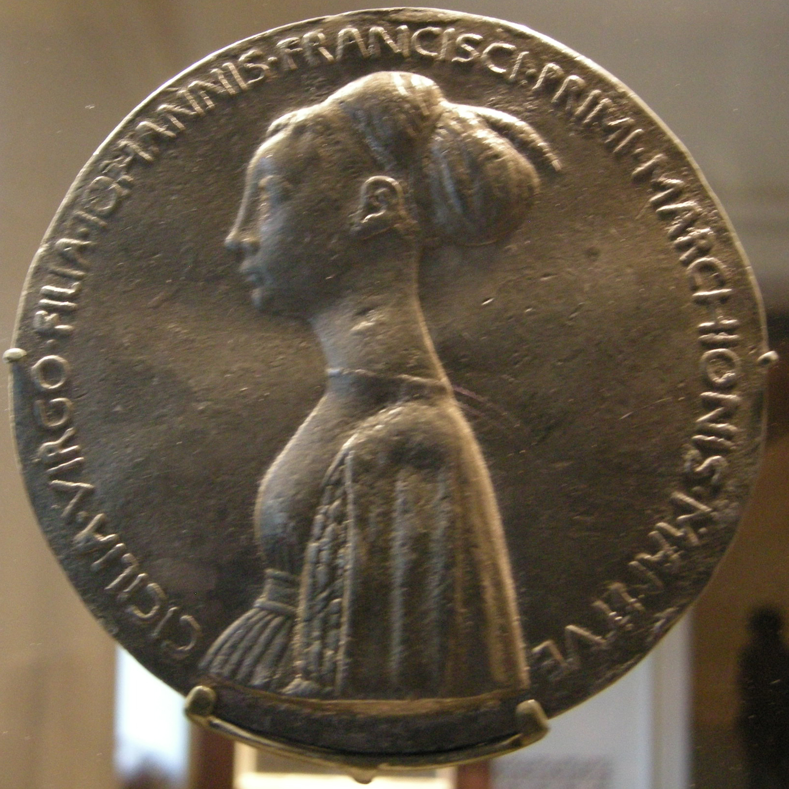 Pisanello, Medaglia di Cecilia Gonzaga, 2011